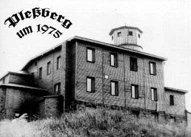 Hotel mit Aussichtsturm auf dem Plessberg